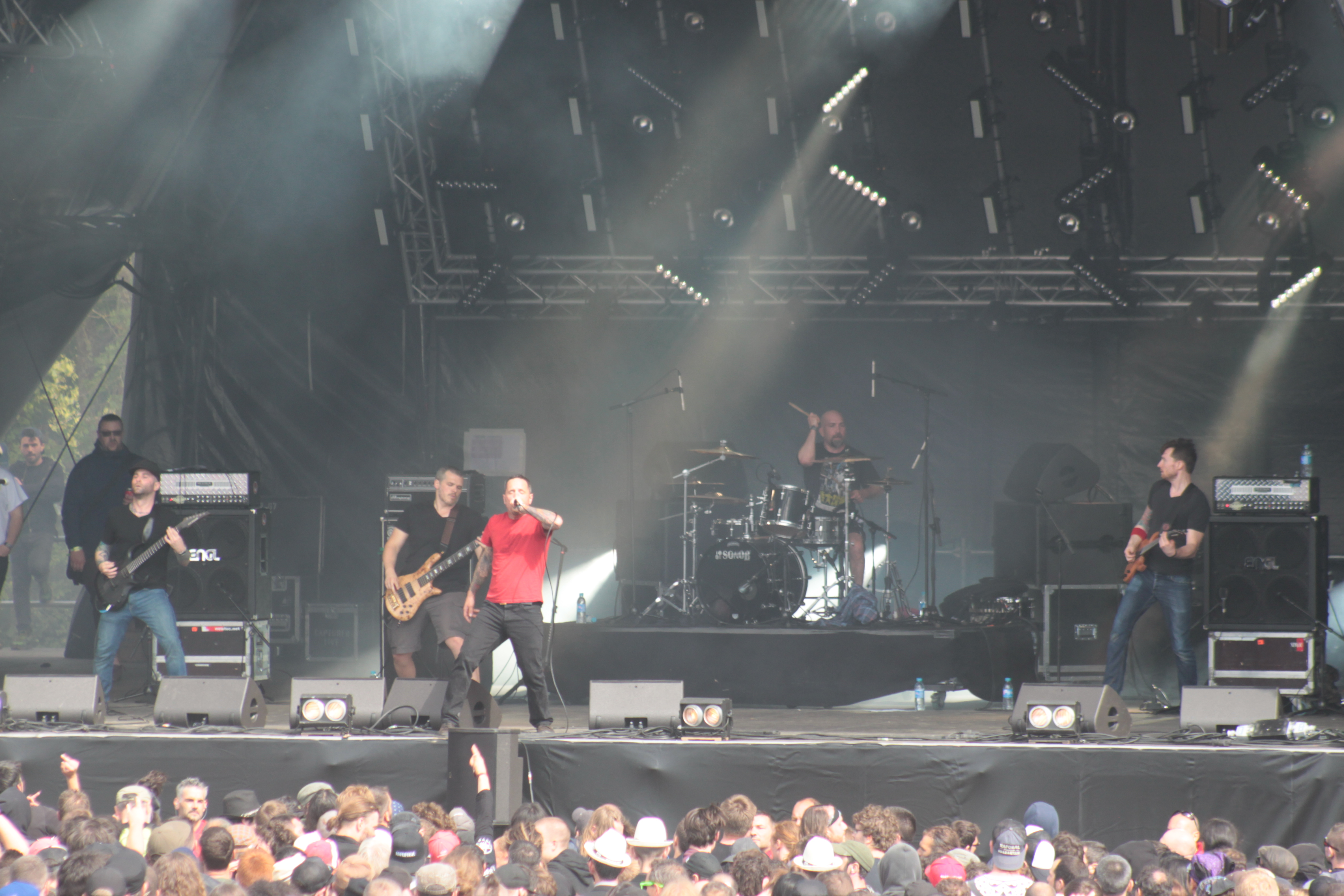 Vision of Disorder, Hellfest 2016.